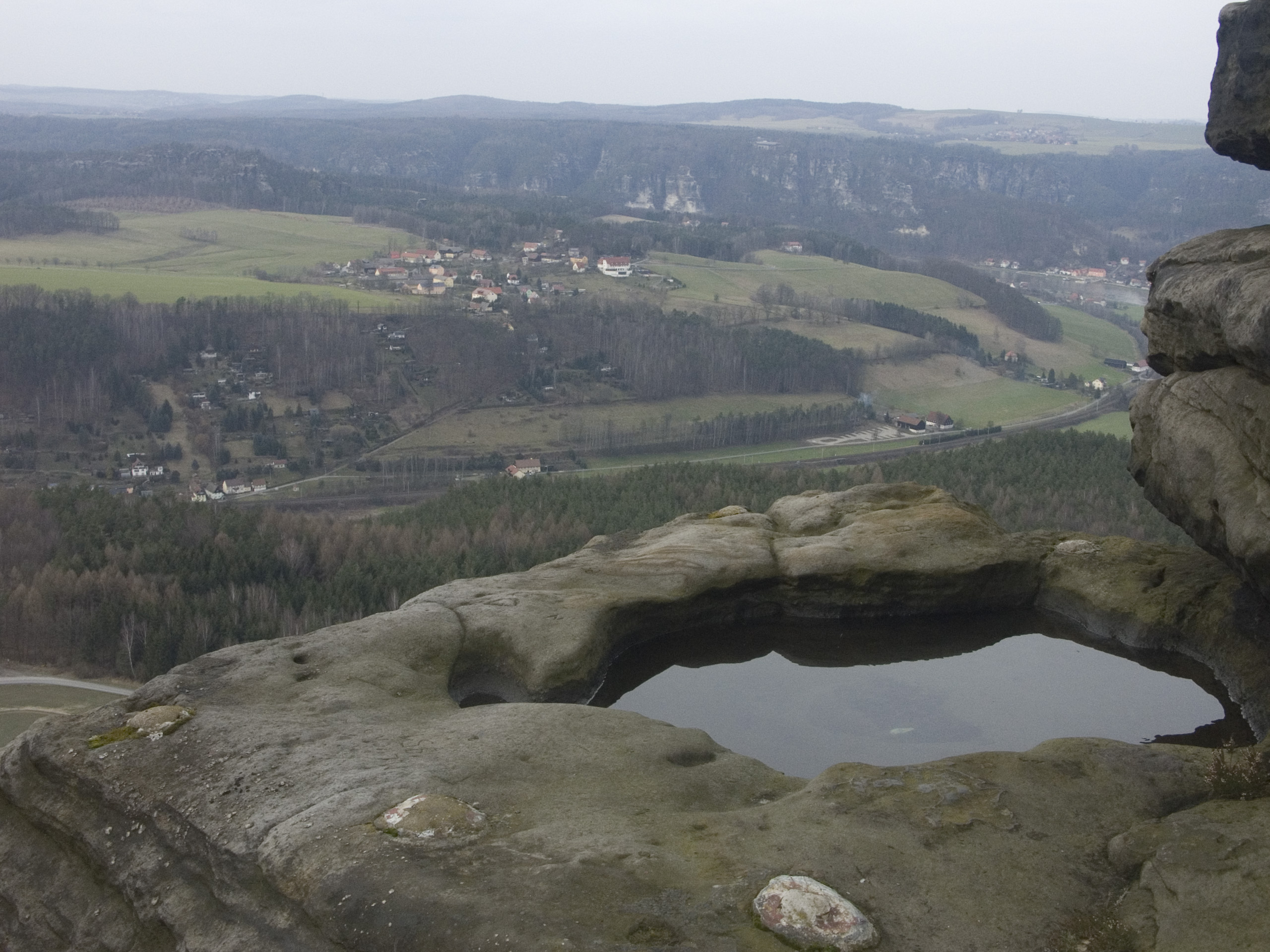 Strand (Ortsteil von Struppen) vom Lilienstein aus fotografiert